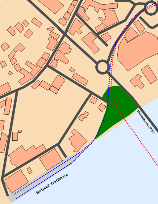 Kort over Hadsund Havnebane i dag. De røde prikker er der hvor Randers-Hadsund Jernbane lagde, de sorte prikker er Hadsund Havnebane lagde, det blå er vand, det mørke grå er veje, det lyse grå er Hadsund Trafikhavn den mørke lyserøde er bygninger, den ledt lyser lyserøde er er byzone, det grønne er en park nede ved fjorden. Billedet skal forstille den sydlige del af Hadsund nord for Hadsundbroen. billedet er lavet om til hvordan hadsund ser ud i dag. Billedet her viser Hadsund ca. 1960